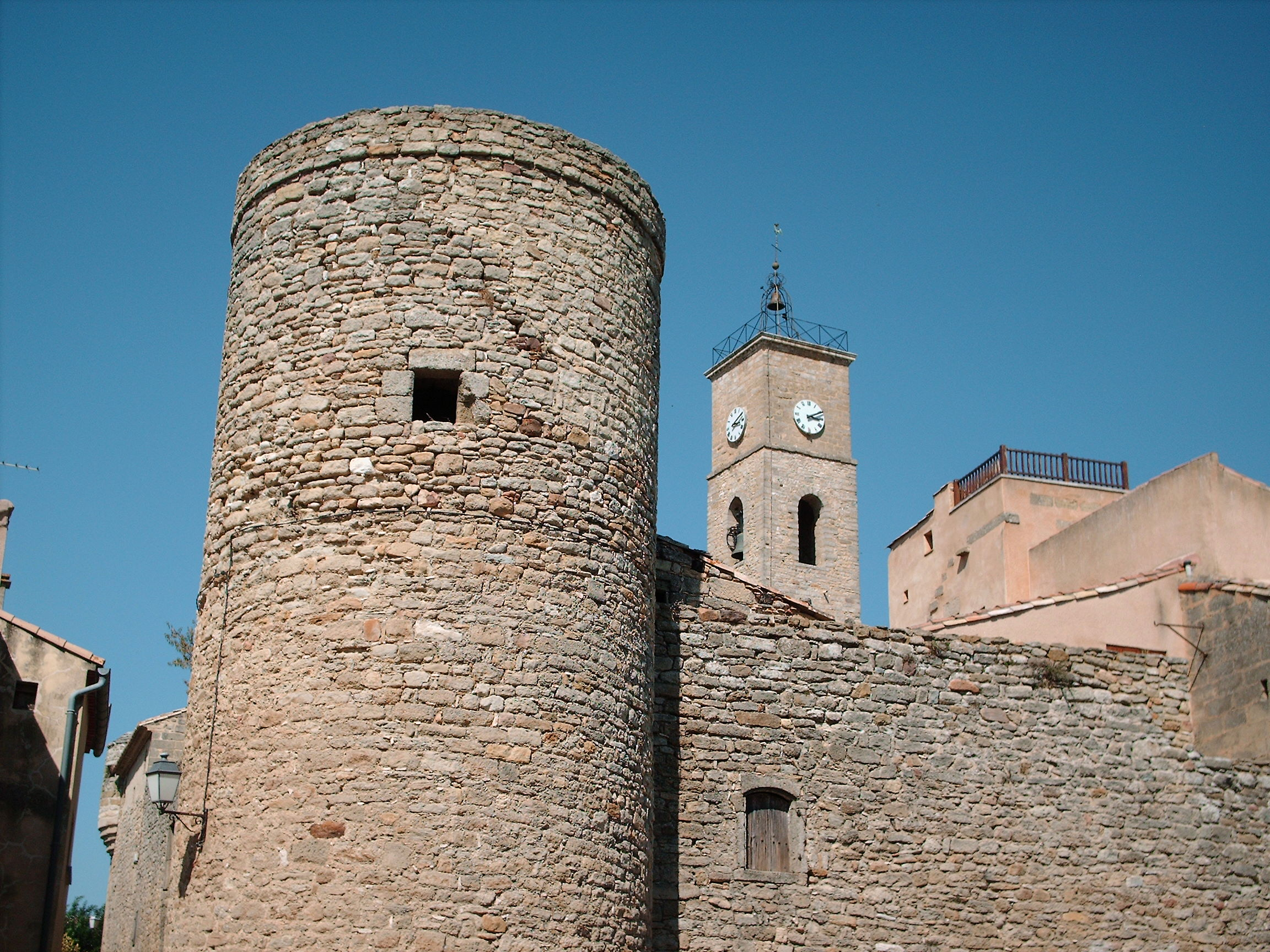 le fort de st laurent la vernède et le clocher